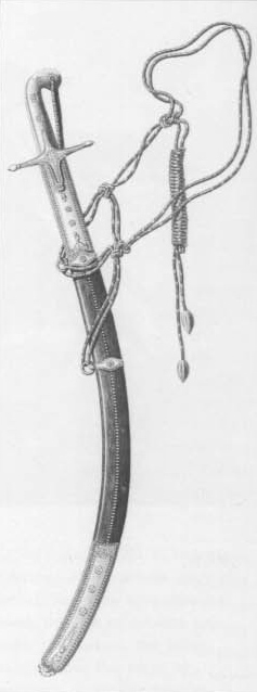 Cimeterre utilisé par les mamelouks en Égypte, et présenté dans la Description de l'Égypte.